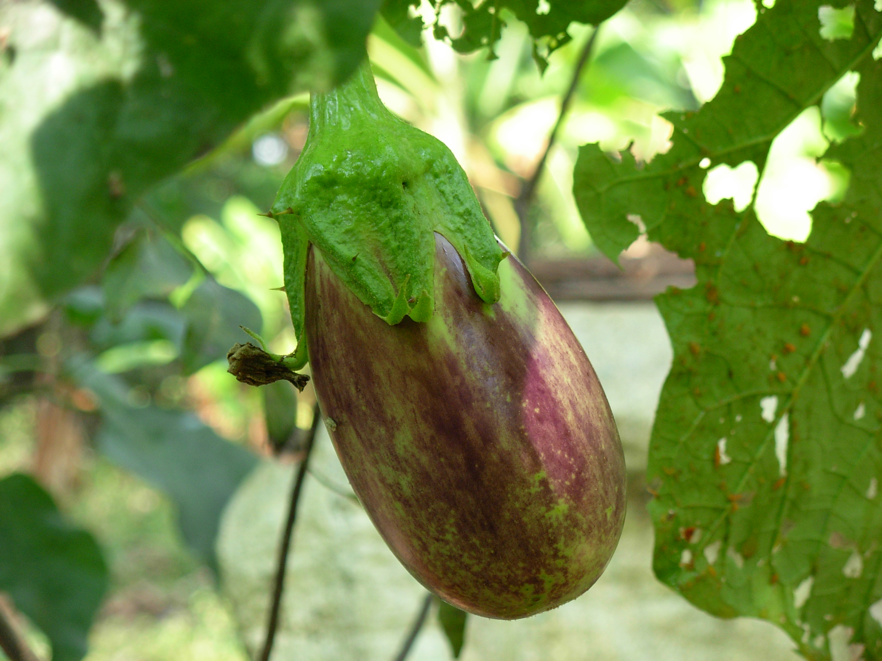 Bringal red